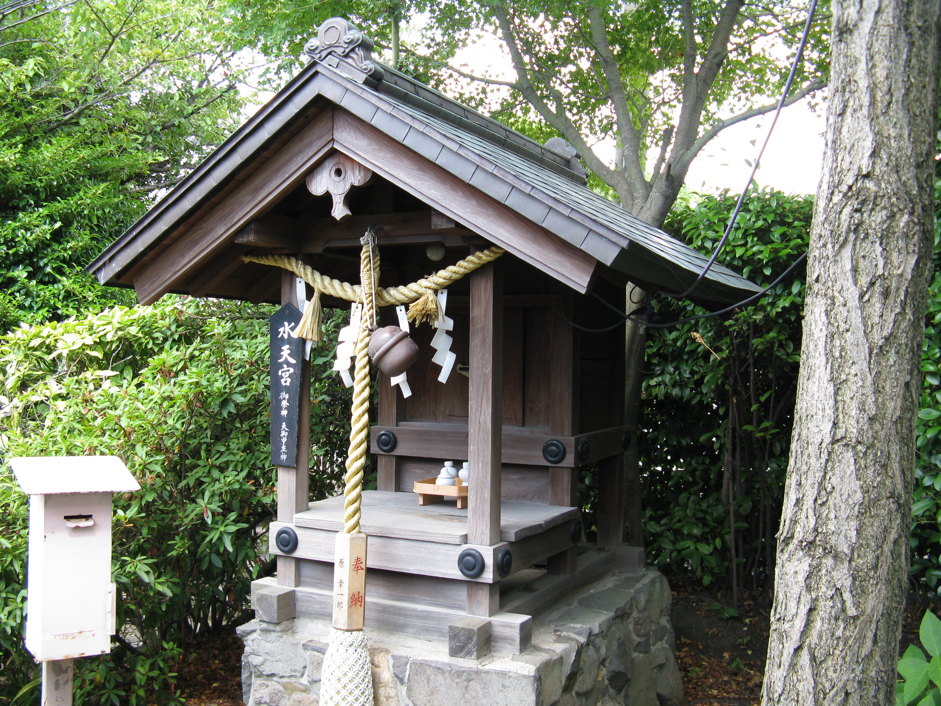 多治速比売神社 水天宮